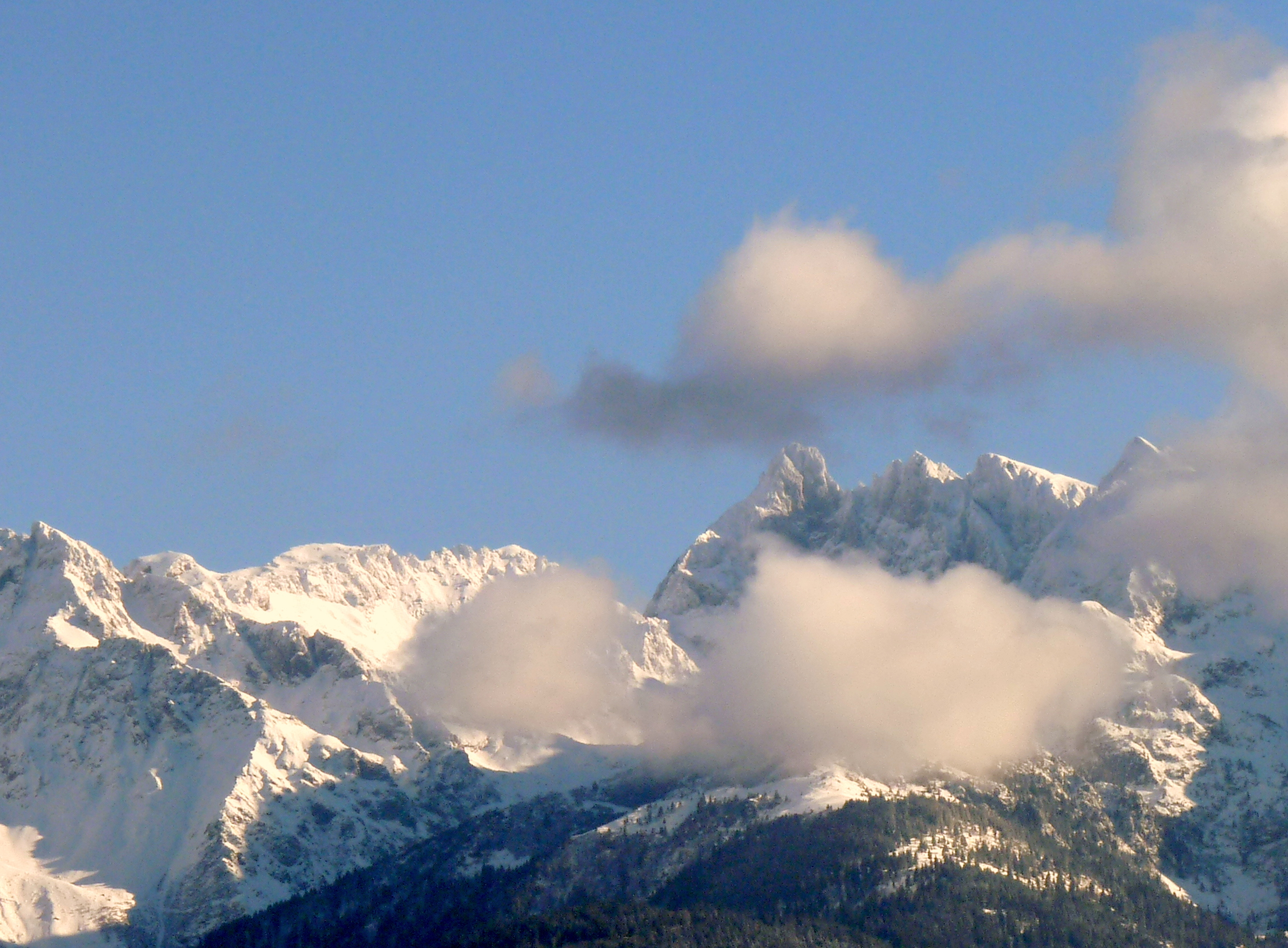 Grand Pic de Belledonne seen from Biviers